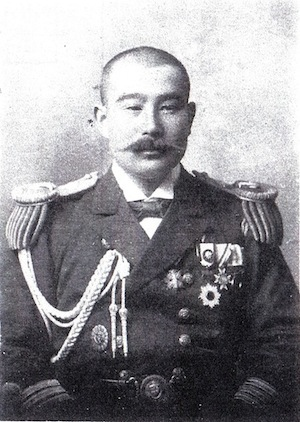 松村菊勇海軍中将